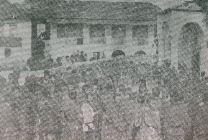 Μαχητές του Βορειοηπειρωτικού Στρατού στη Μονή Τσέπου (1914)